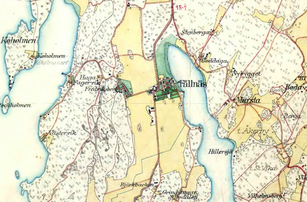 Fållnäs J112-67-13,Häradsekonomiska kartan (del av), Fållnäs gård